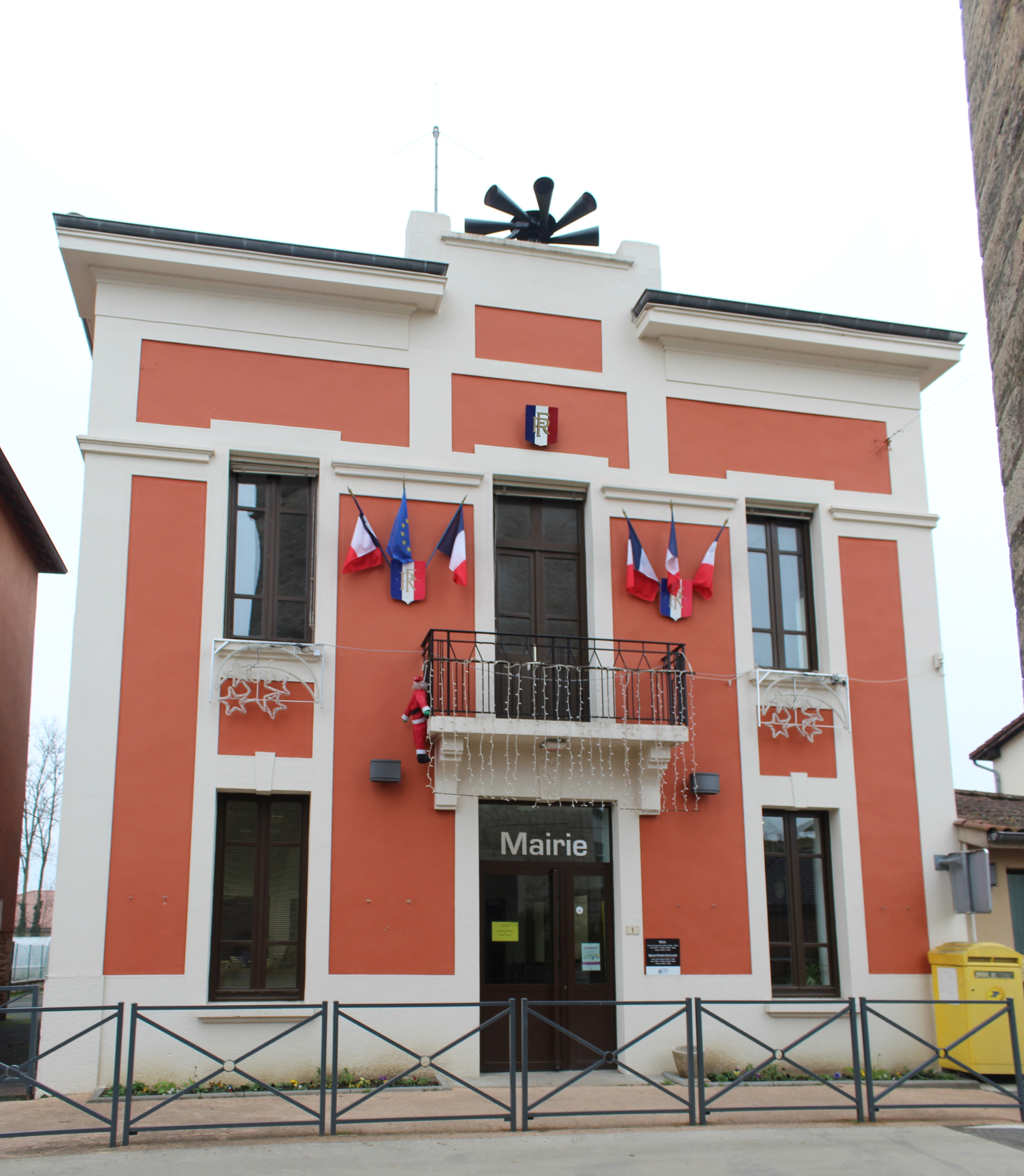 Mairie de Saint-Étienne-sur-Chalaronne.